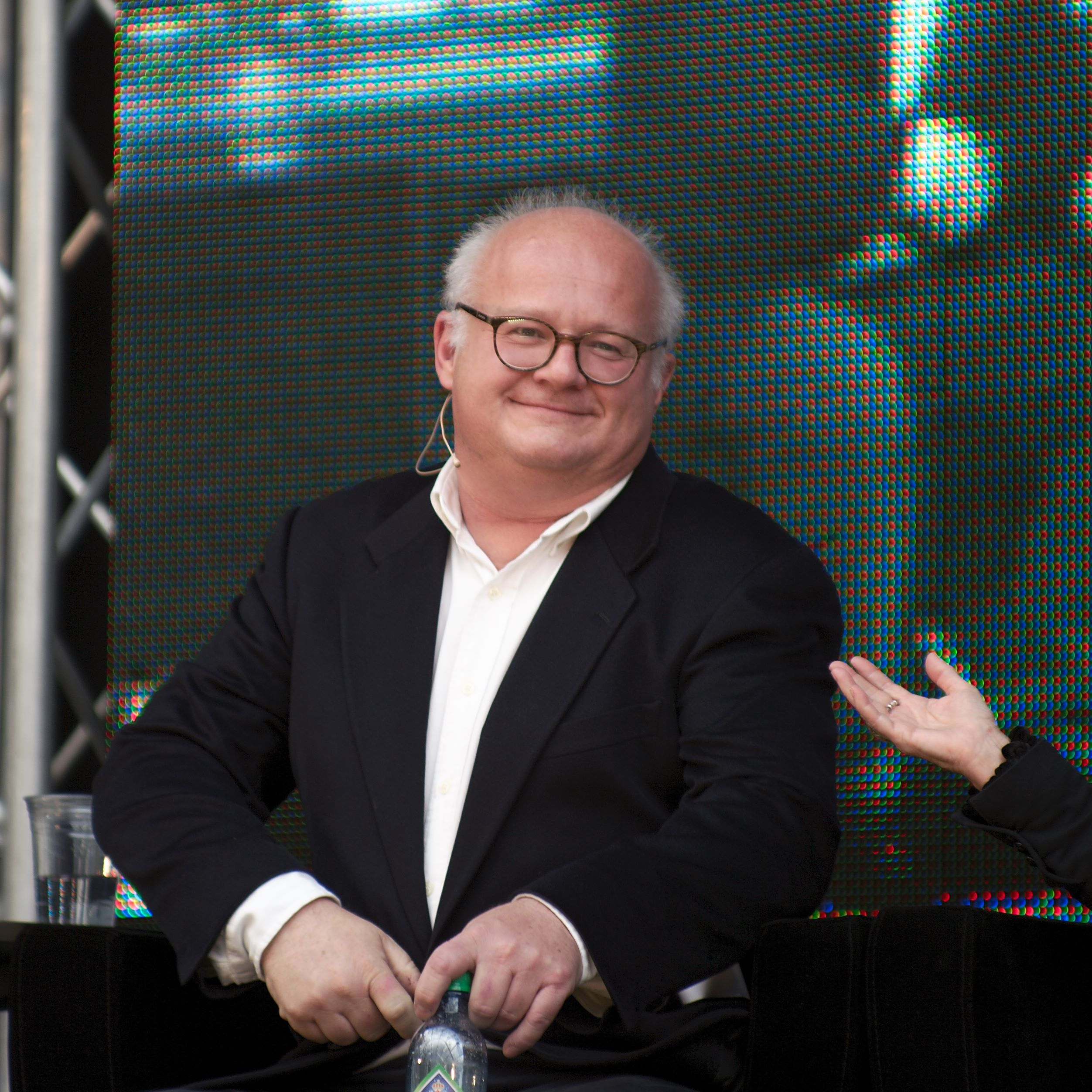 Finn Bjelke at Oslo bokfestival.